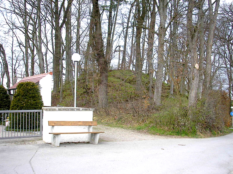 Hochmittelalterlicher Burgstall (Turmhügelburg) Eurasburg bei Friedberg (Landkreis Aichach-Friedberg, Bayerisch-Schwaben). Der Turmhügel von Westen. Eigene Aufnahme, April 2008 / High Middle Ages motte-and-bailey castle Eurasburg near Friedberg (Bavaria, Germany). The motte from the west. Own photo, April 2008